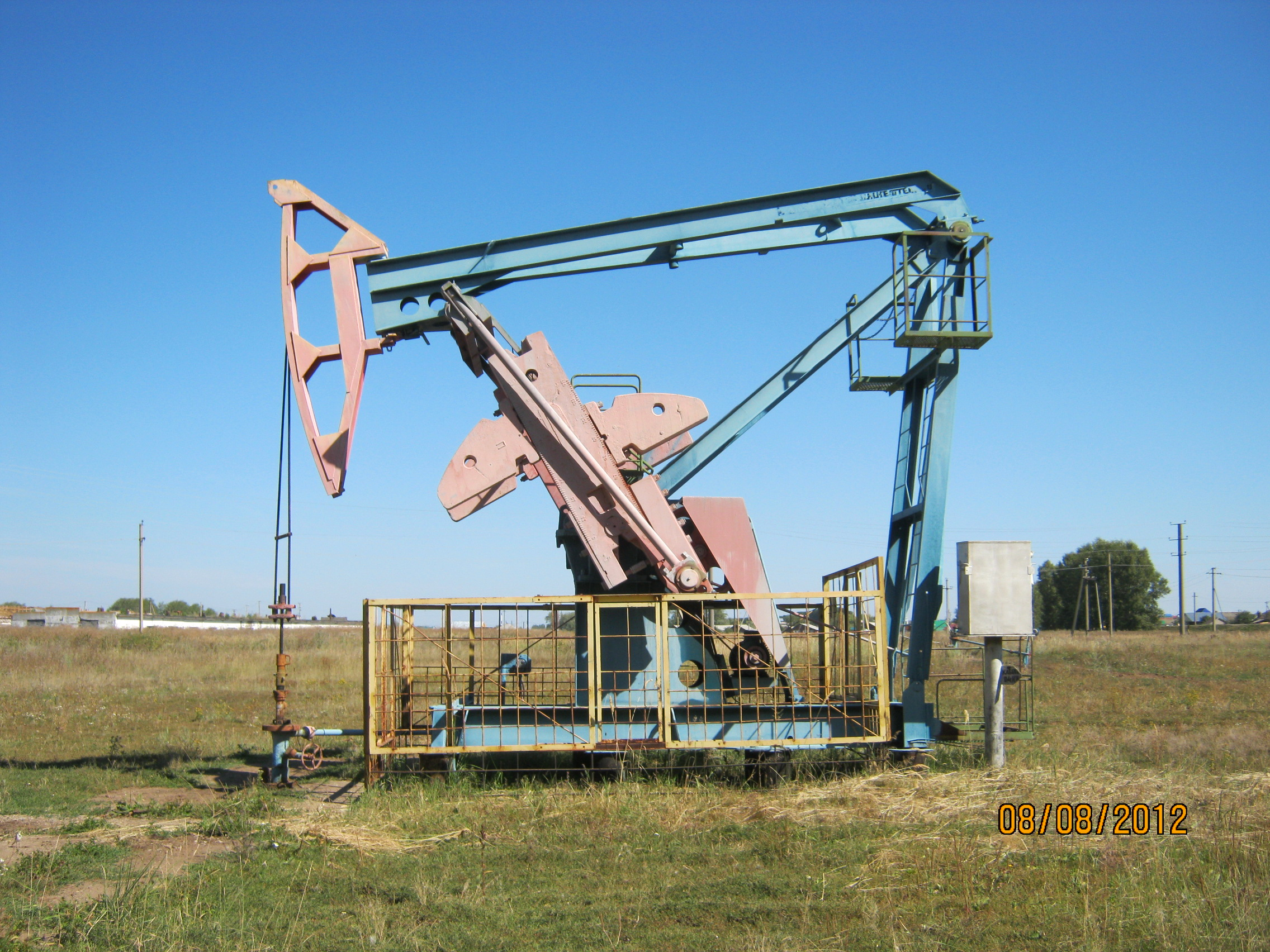 Станок-качалка одноплечий. Модель СКМР6-2,5